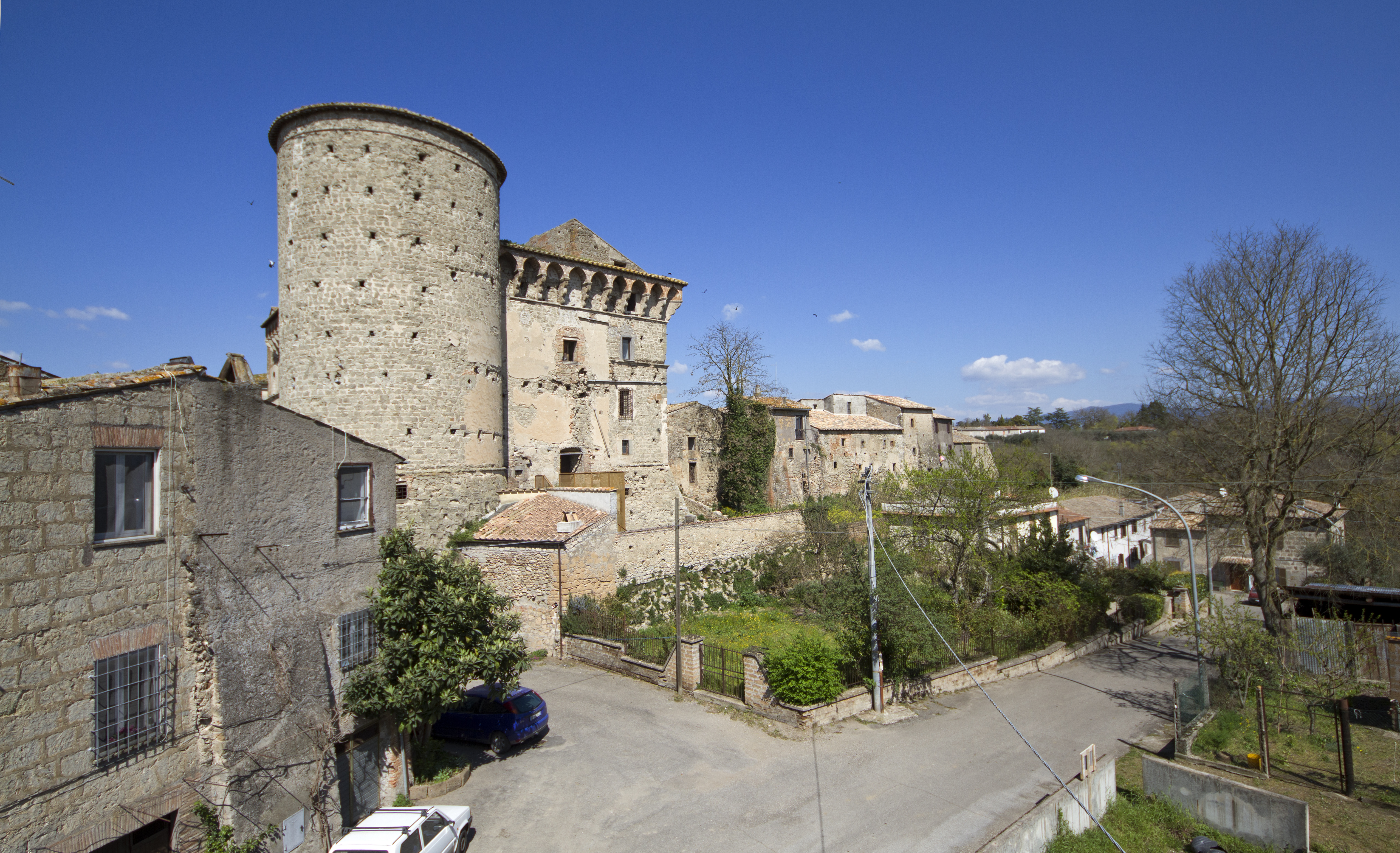 01020 Graffignano VT, Italy